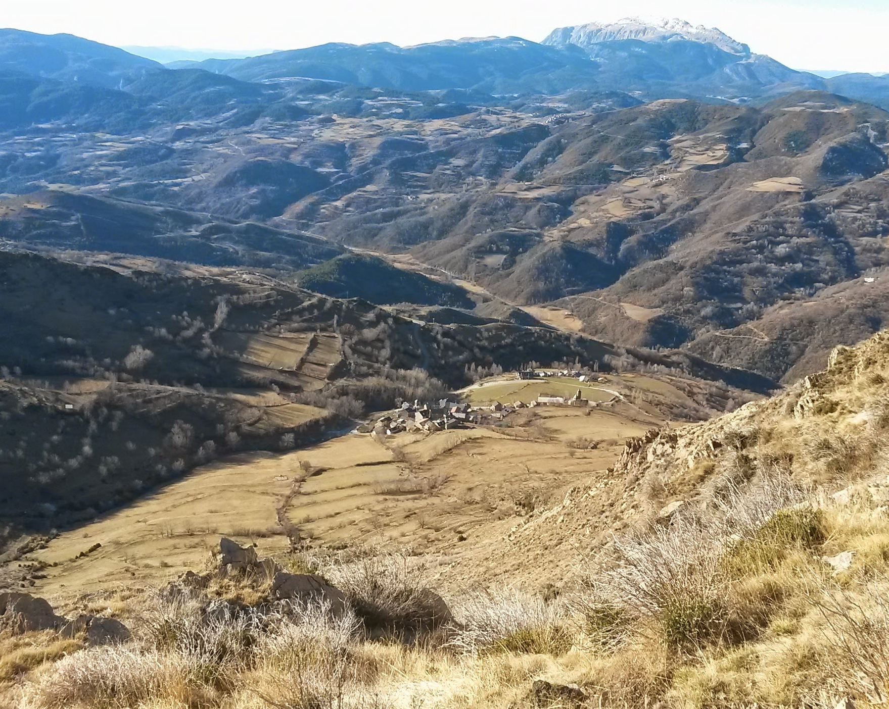 Poble de Castanesa amb la vall homònima i el cim del Turbó al fons